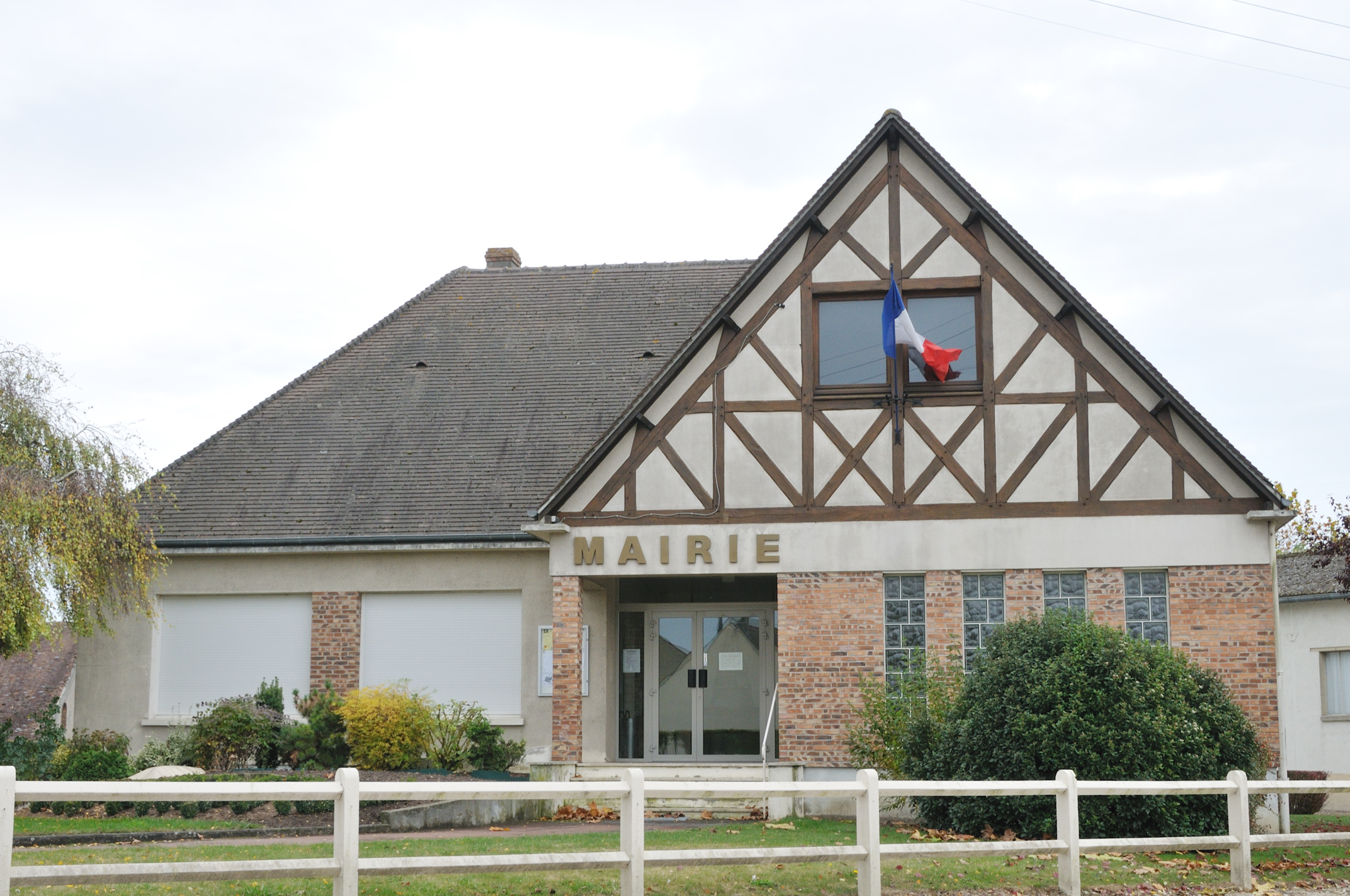 Mairie de Vimory, Loiret, France